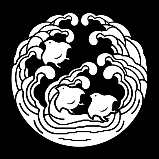 「波に千鳥」紋（染抜）